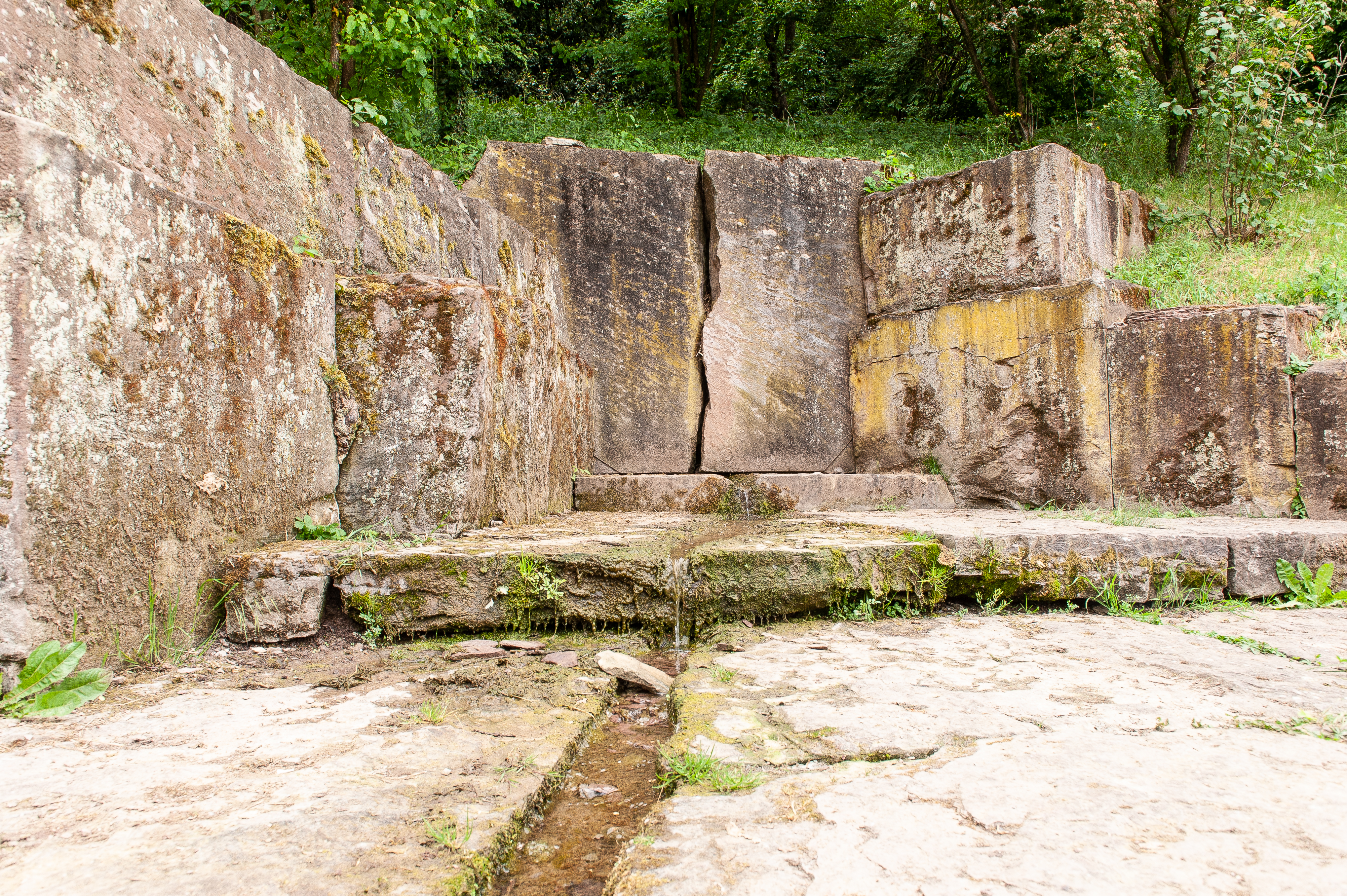 Kunststation "Im Keuper" von Hans Dieter Bohnet, Gelände der Internationalen Gartenbauausstellung 1993, Stuttgart